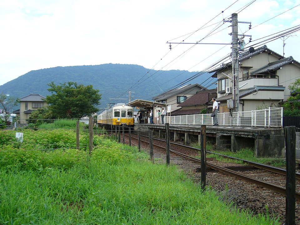 琴電琴平線榎井駅 高松築港行き列車が進入 背後は象頭山